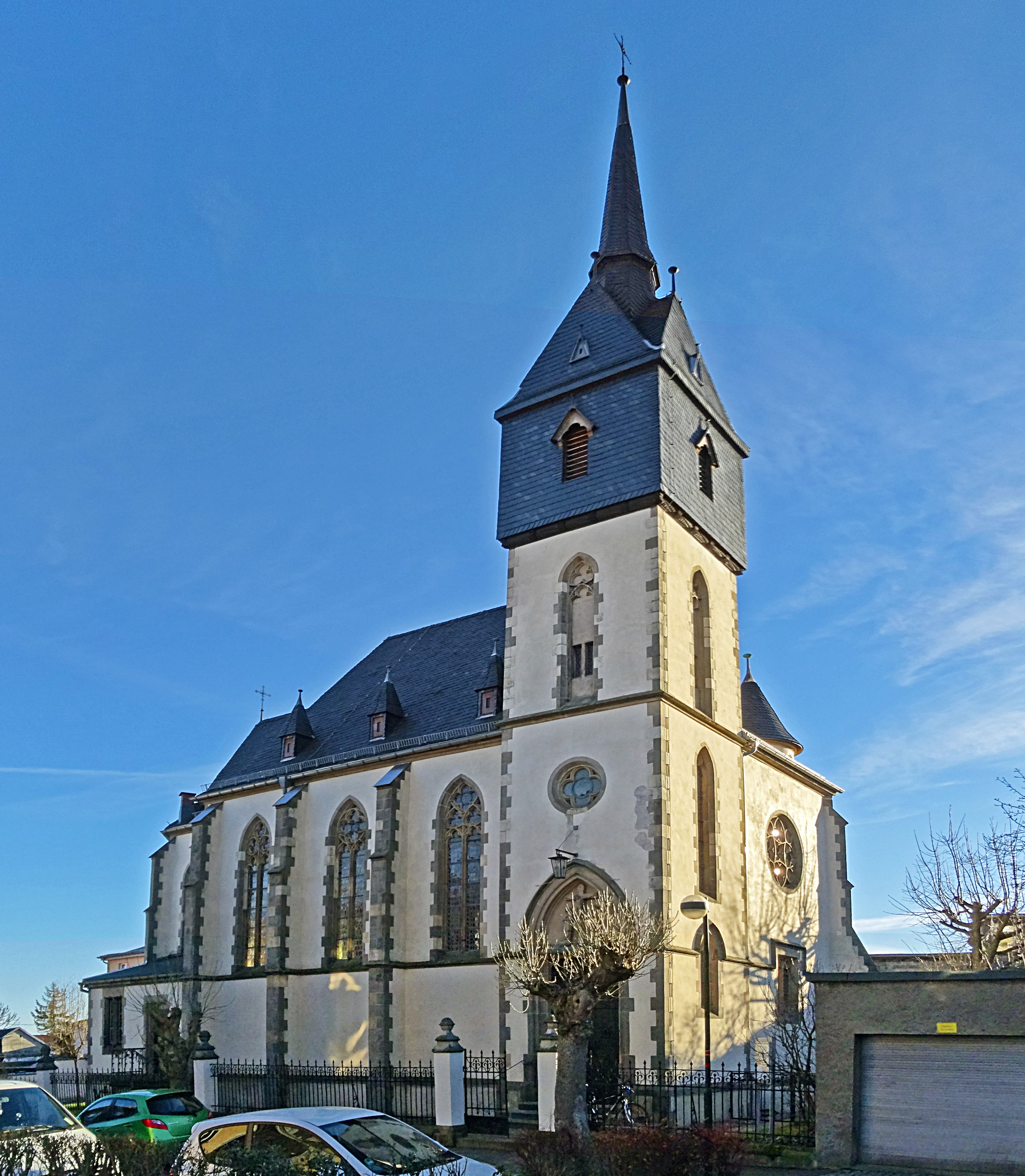 Kirche St. Karl Borromäus in Friedrichroda von Westen gesehen